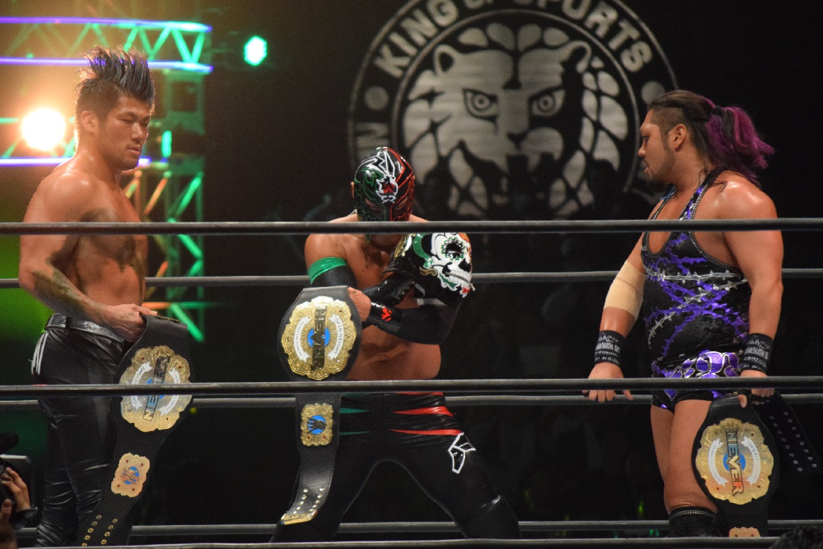 2017年2月11日 大阪府立体育会館 「THE NEW BEGINNING in OSAKA」 SANADA（左）、BUSHI（中）、EVIL（右）